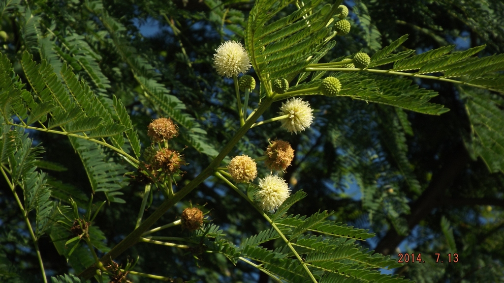 Flor de Leucaena leucocephala